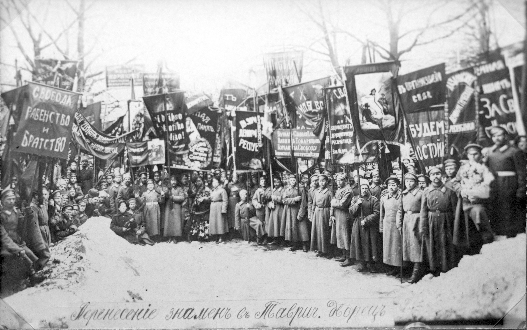 Перенесение знамён в таврический Дворец